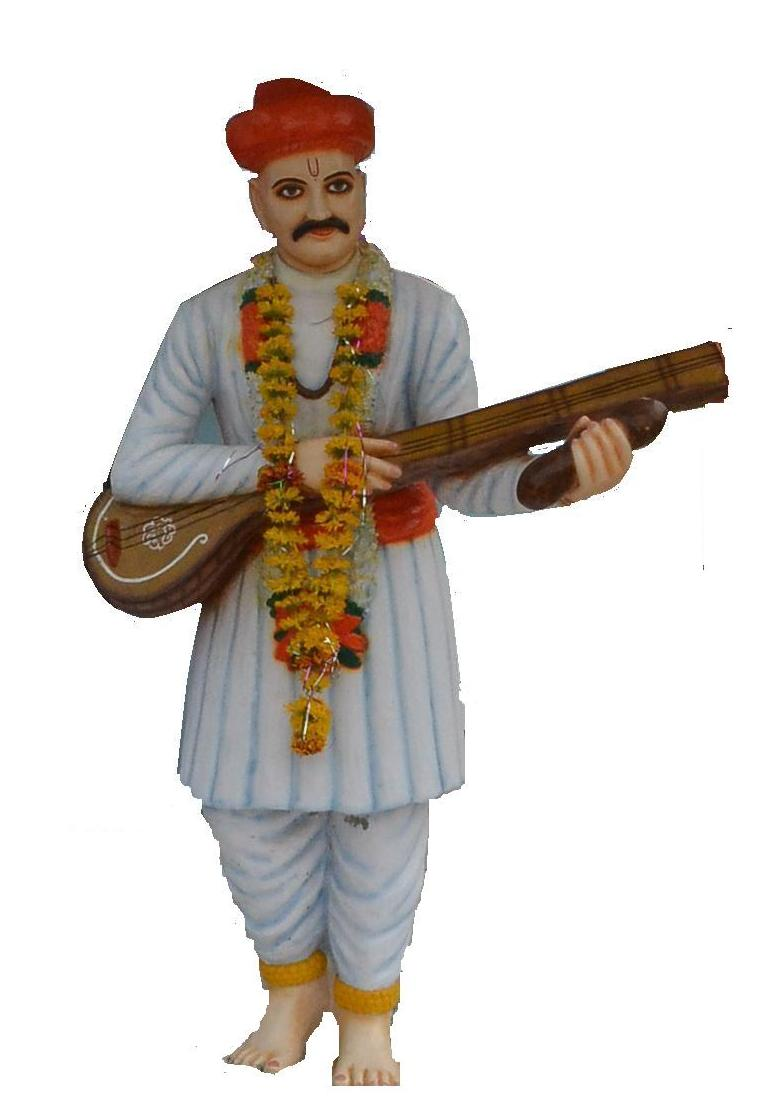 jai namdev